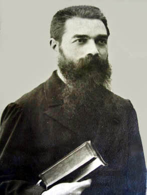 Juan Bautista Canut de Bon Gil1​ (Valencia, 30 de septiembre de 1846-Santiago, 9 de noviembre de 1896) fue un predicador español que difundió su fe protestante y fundó Iglesias evangélicas en Chile durante el siglo XIX.